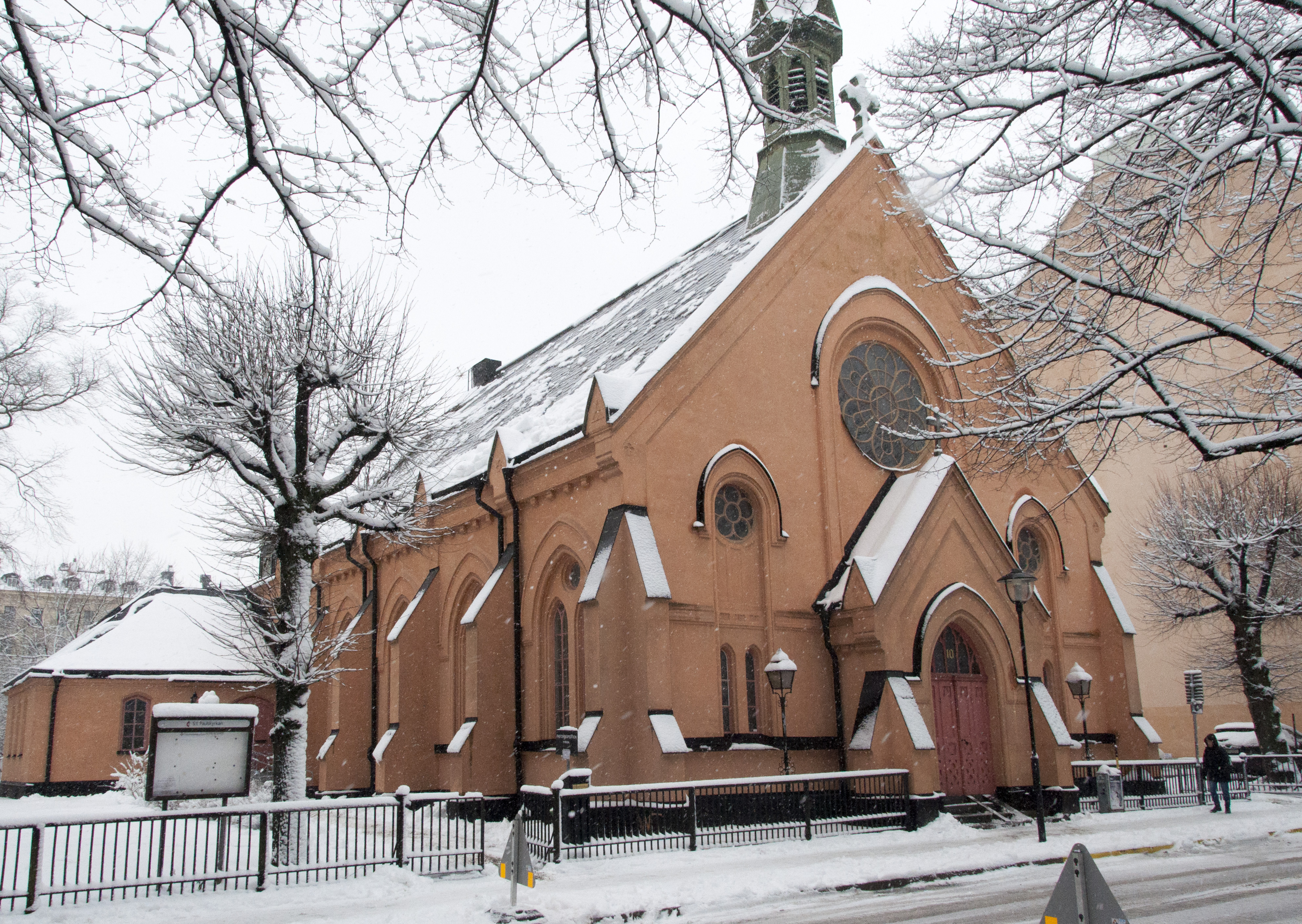 S:t Paulskyrkan, Rosendal mindre 6, Mariatorget 10, Nybyggnadsår, 1875 - 1876, Johansson & Hammarlund (Byggmästare), Kumlien Axel & Kumlien Hjalmar (Arkitekt), Metodistföreningen (Byggherre)